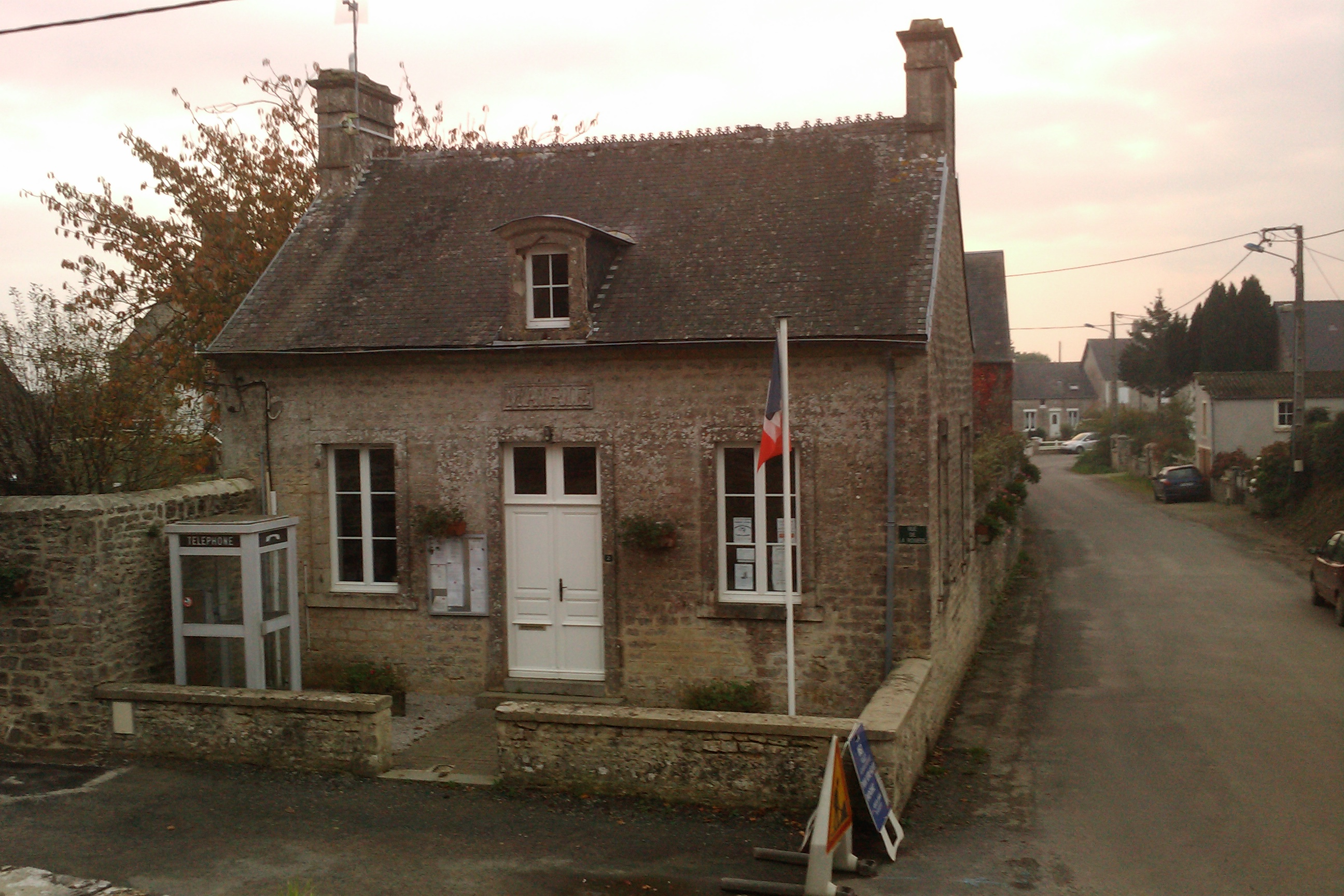 Mairie d'Amfreville